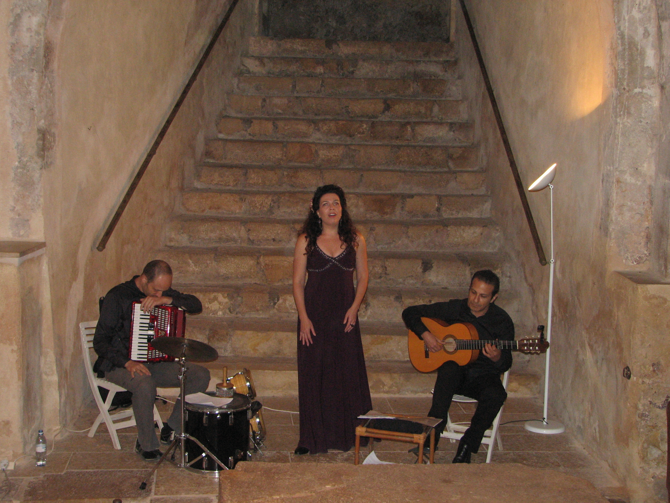 The Abu Ghosh Music Festival is held twice a year, in the fall and late spring, with musical ensembles and choirs from Israel and abroad performing in and around the churches in Abu Ghosh פסטיבל אבו גוש הוא פסטיבל מוזיקה ווקאלית, המתקיים כיום בסוכות ובשבועות, בכנסיית גבירתנו של ארון הברית ובכנסיות של המנזר הבנדיקטיני Irit Stark – soprano - Spanish Sensuality with De Falla and Almodovar אירית שטרק במופע חושניות ספרדית עם דה פאיה ואלמודובר